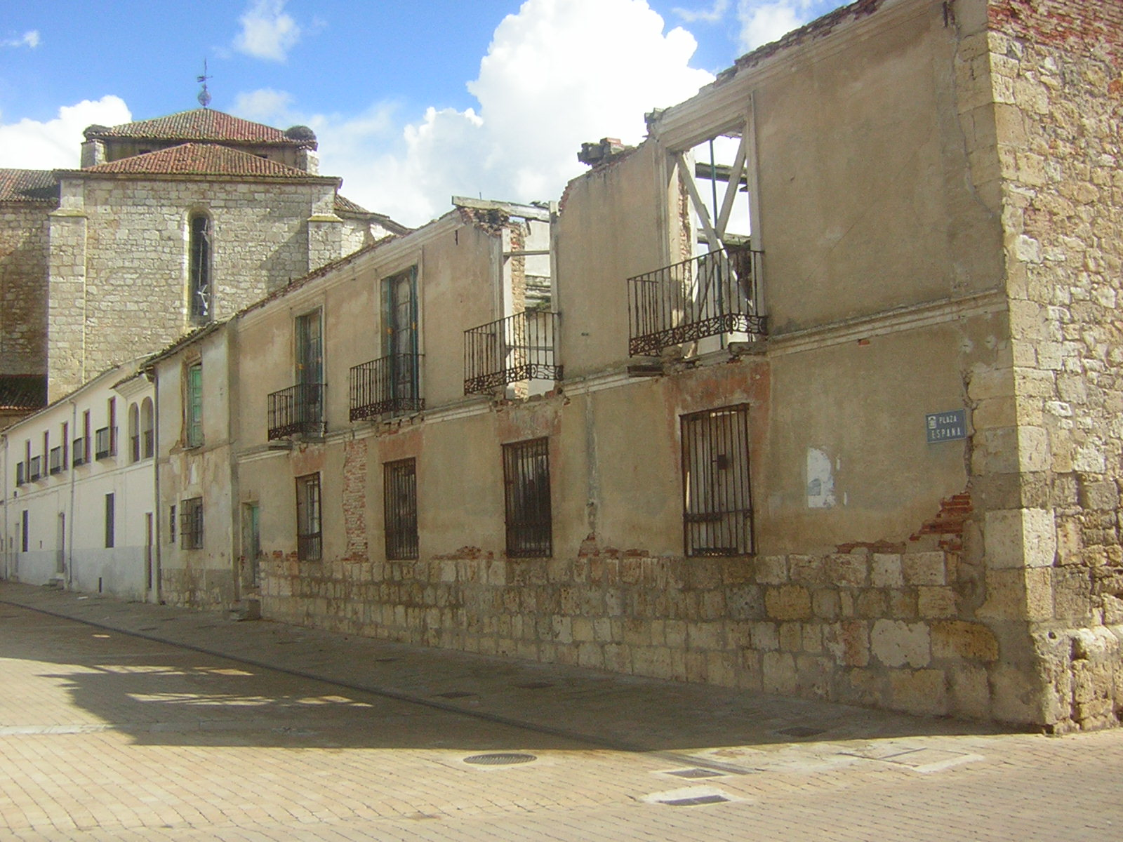 Fachada a la Plaza de España del palacio de los condes de Buendía en Dueñas (antes de su hundimiento en 2010)